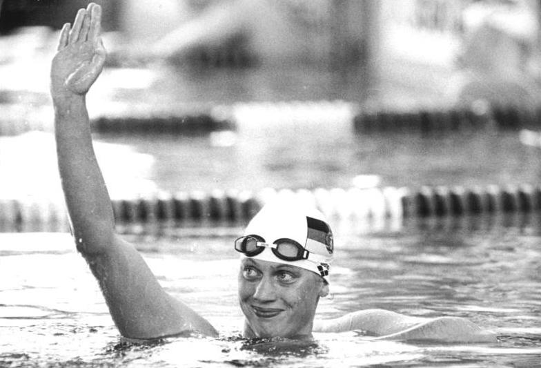 Heike Friedrich ADN-ZB Settnik 20.7.88 Potsdam: 39. DDR-Meisterschaften im Schwimmen- Die mehrfache Welt- und Europameisterin Heike Friedrich (SC Karl-Marx-Stadt) siegte im Finale über 200 Meter Freistil in glänzenden 1:57,87 min.